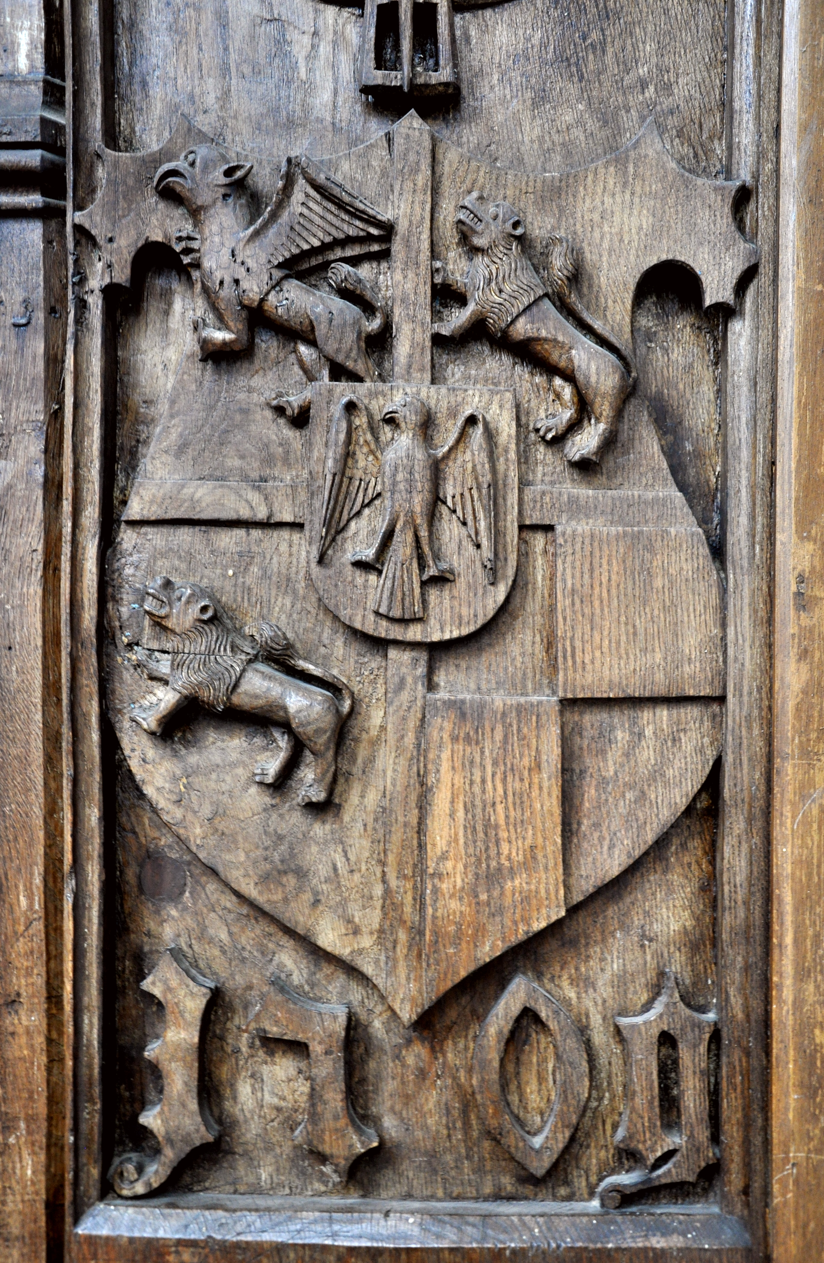 Bordesholm, Klosterkirche, Chorgstühl von 1509